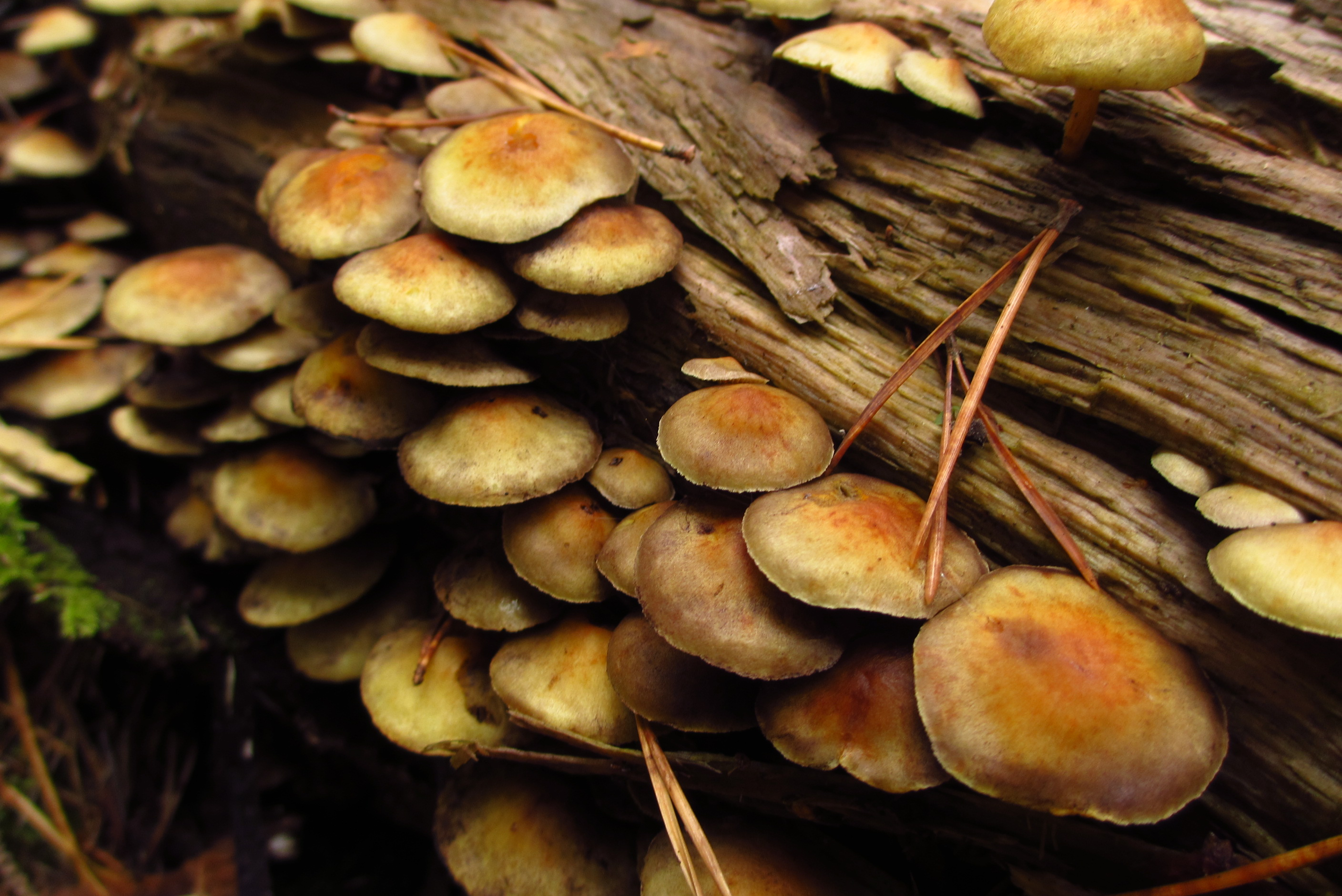 Sälk-kollanutid Jaanika metsas Harjumaal